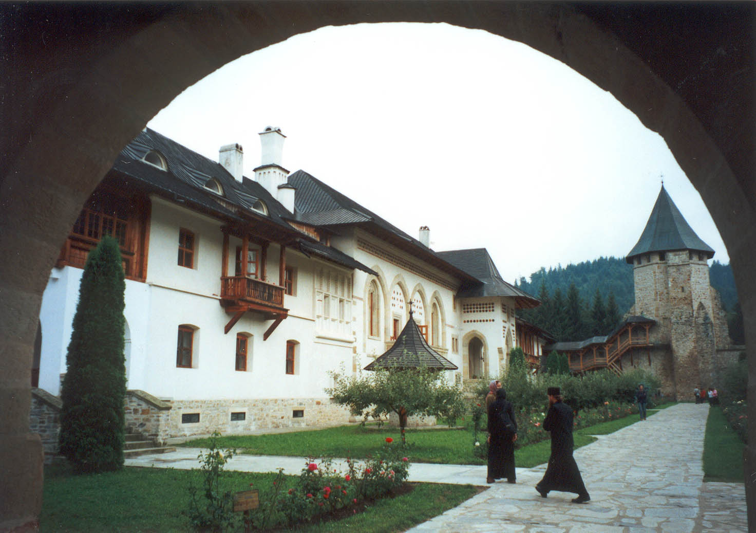 Putna Monastery